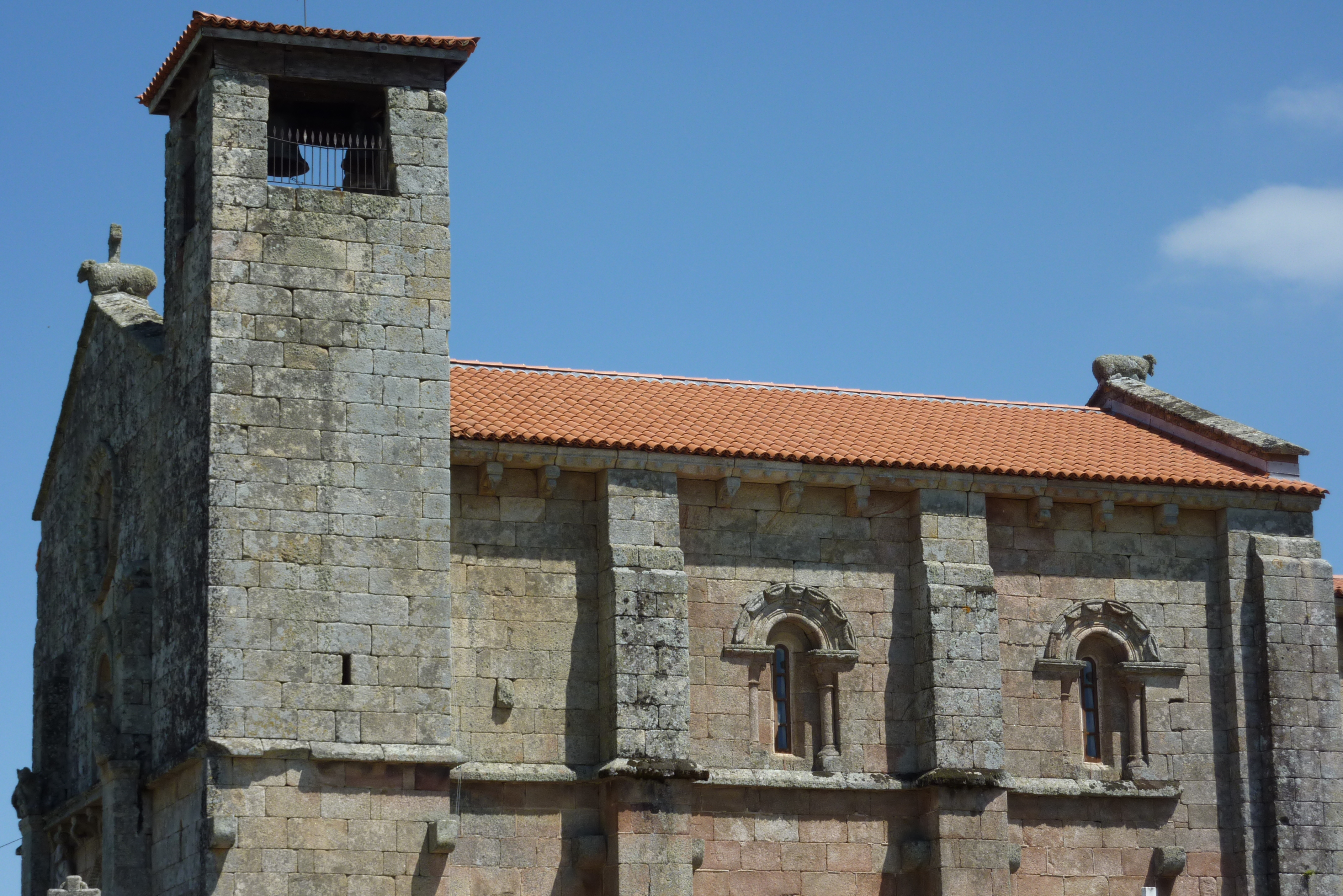 Pfarrkirche San Pedro (A Mezquita), Ansicht von Süden